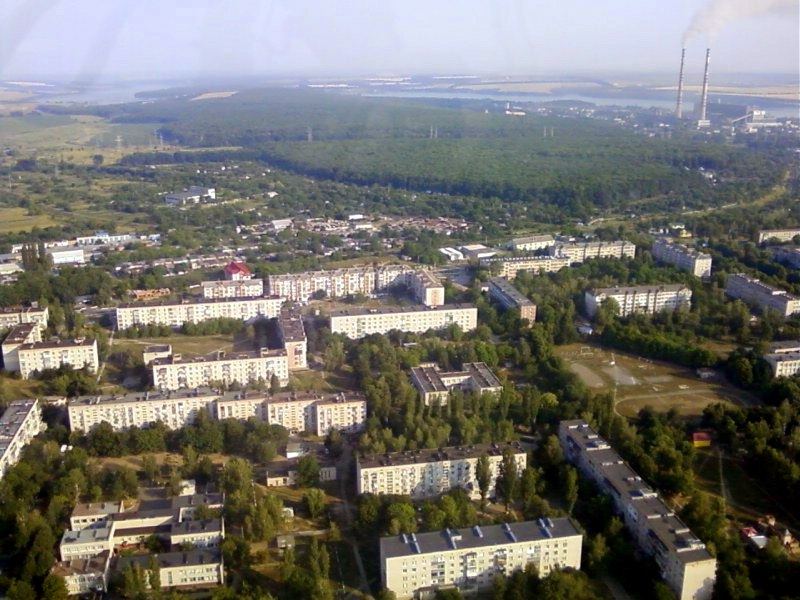 Місто Ладижин, Вінницька область. Зйомка з повітря.